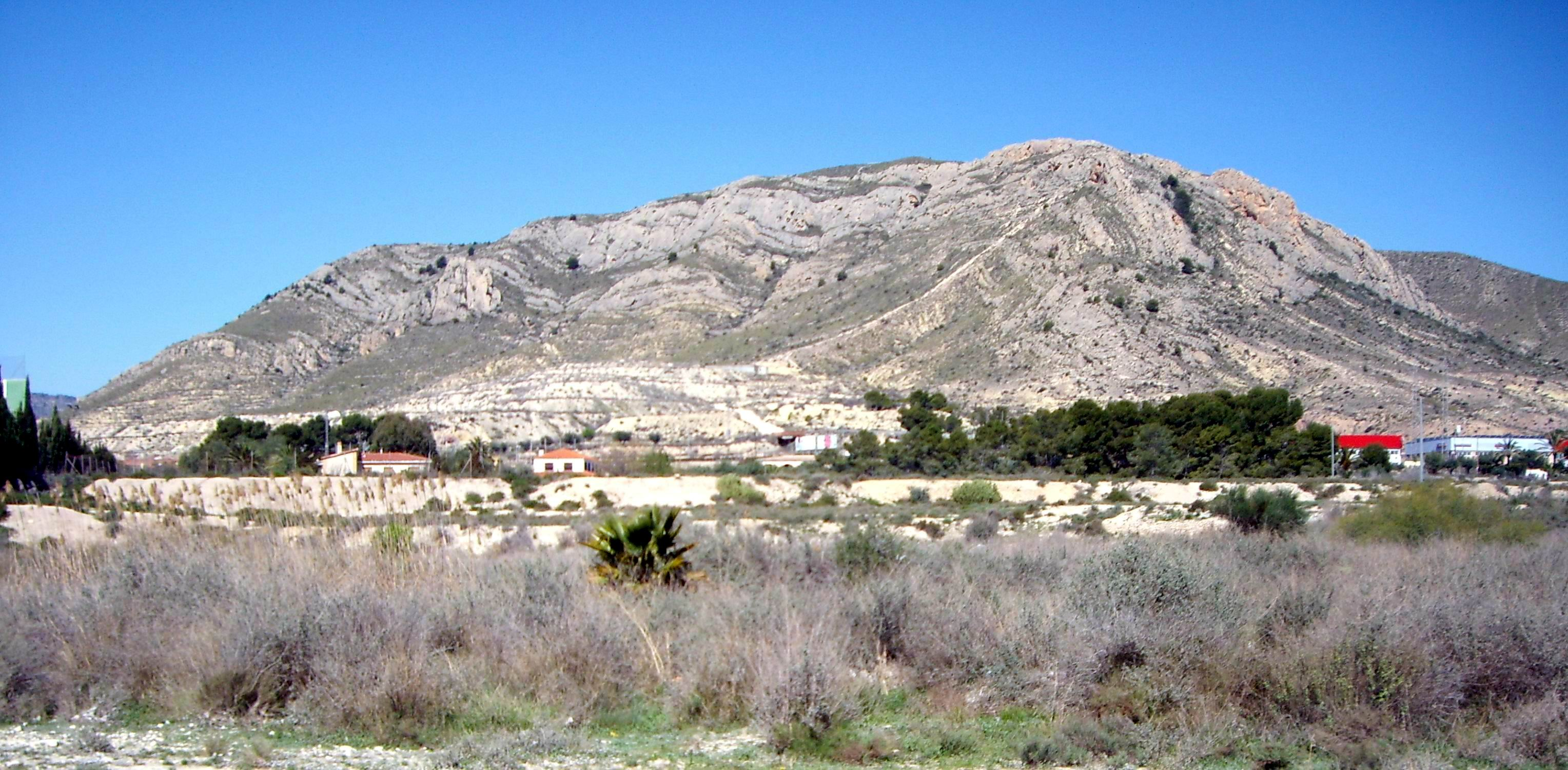 Monte Bolón, en Elda